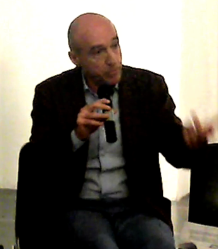 Marco Preve al convegno #LIBERI DI ESSERE INFORMATI - Genova, 16 Giugno 2016